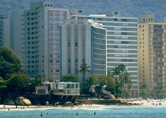 Praia do Guarujá, São Paulo. Praia das Astúrias, podendo ser visto o Edifício Sobre As Ondas e a Casa da Pedra (obra de Gregory Warchavick).